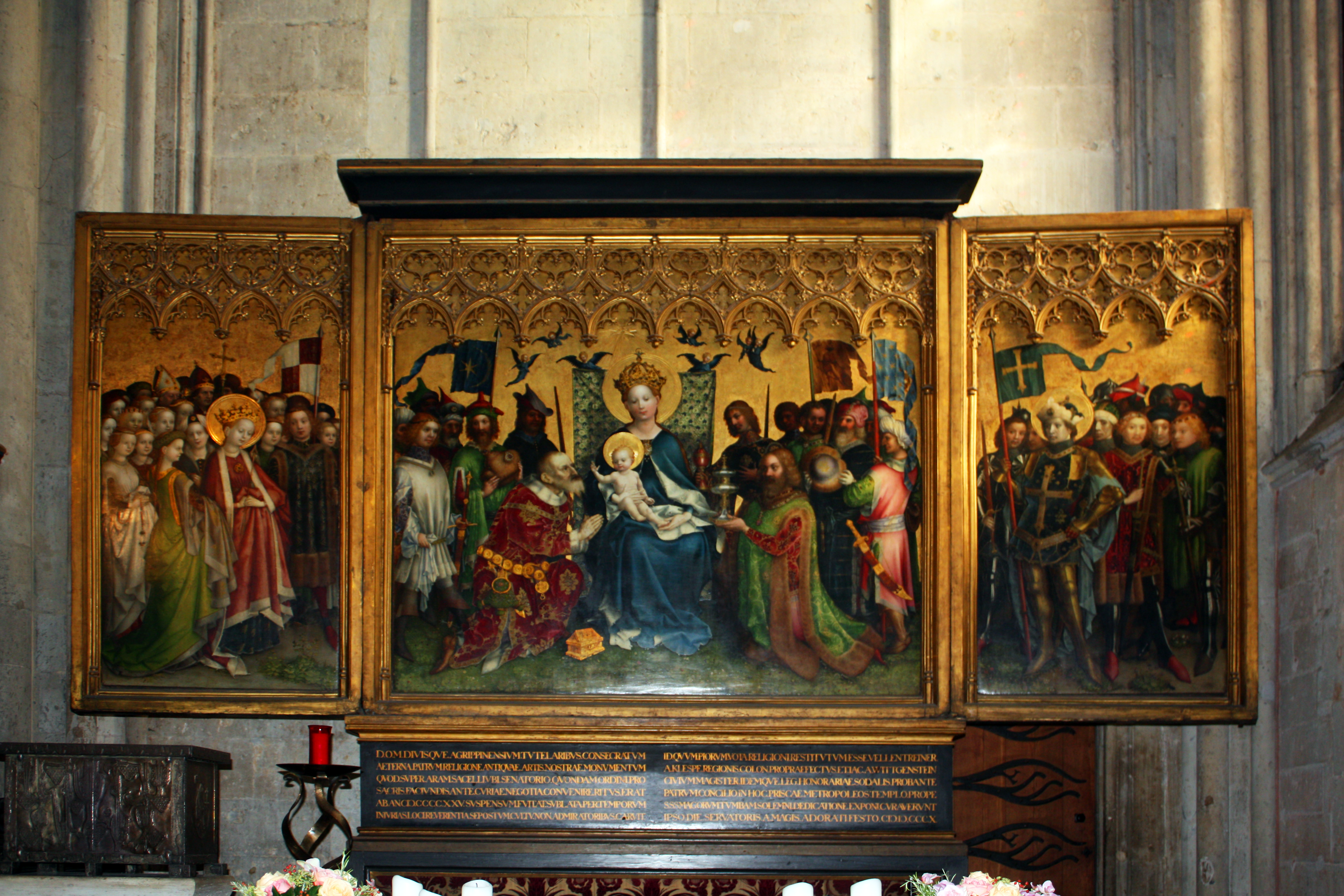 Kölner Dom Marienkapelle. Das 1445 für die Ratskapelle in Köln geschaffene Triptychon Stephan Lochners, wird als Dombild, Dreikönigsaltar oder als Bild der Kölner Stadtpatrone bezeichnet